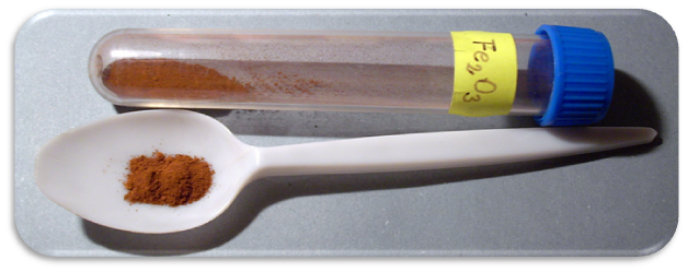 Oxid železitý - Fe2O3